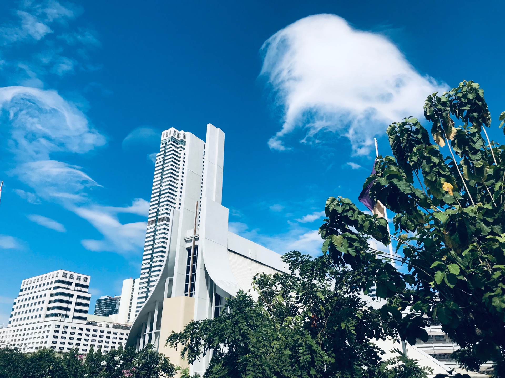 ภาพหอธรรม โรงเรียนกรุงเทพคริสเตียนวิทยาลัย ที่ถ่ายเมื่อวันที่ 28 พฤศจิกายน 2562 วันที่ สช. มีการประกาศ ของ SAVEBCC